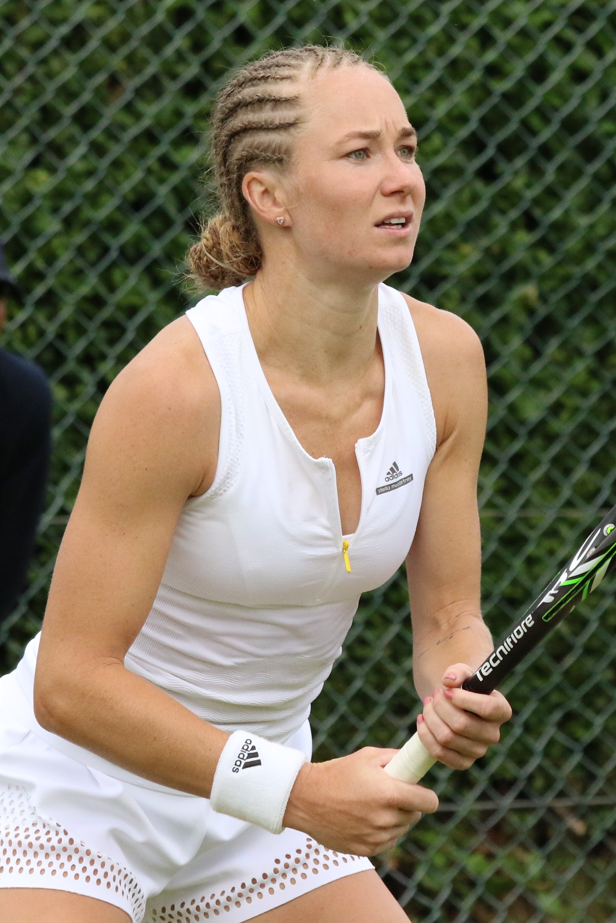 Glushko WMQ16 (12)